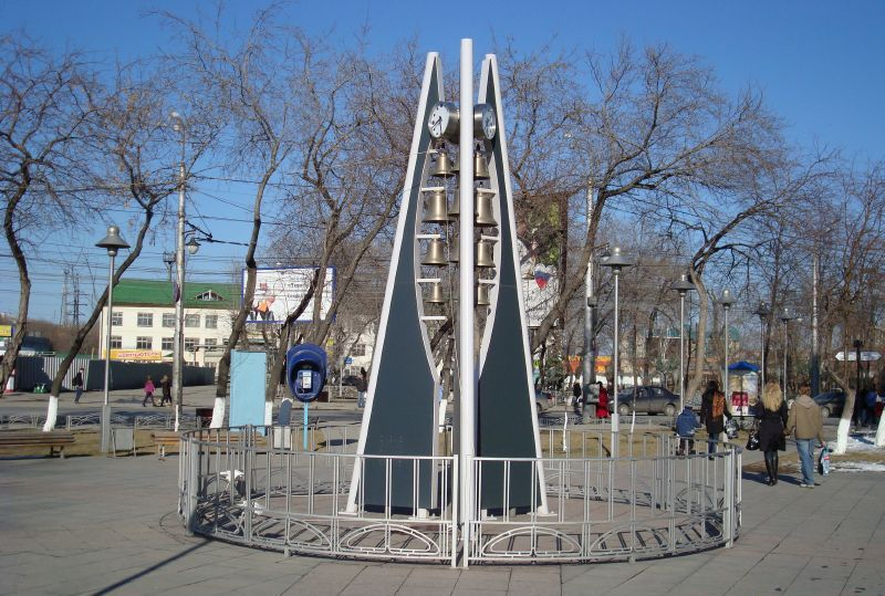 Музыкальные часы на перекрёстке улиц Мориса Тореза и Республики (Тюмень), возле отделения Сбербанка.